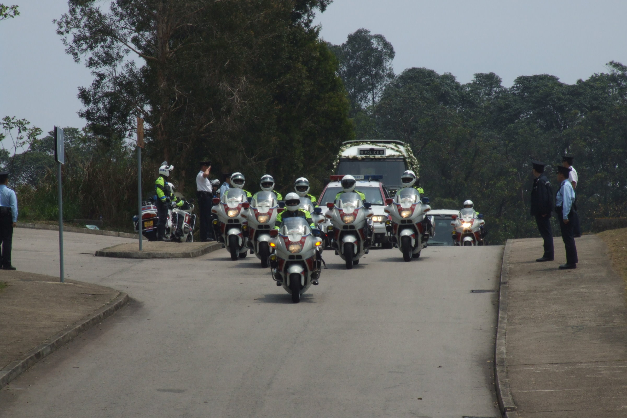 中文（香港）: 警察護送隊護送陳家偉遺體到浩園